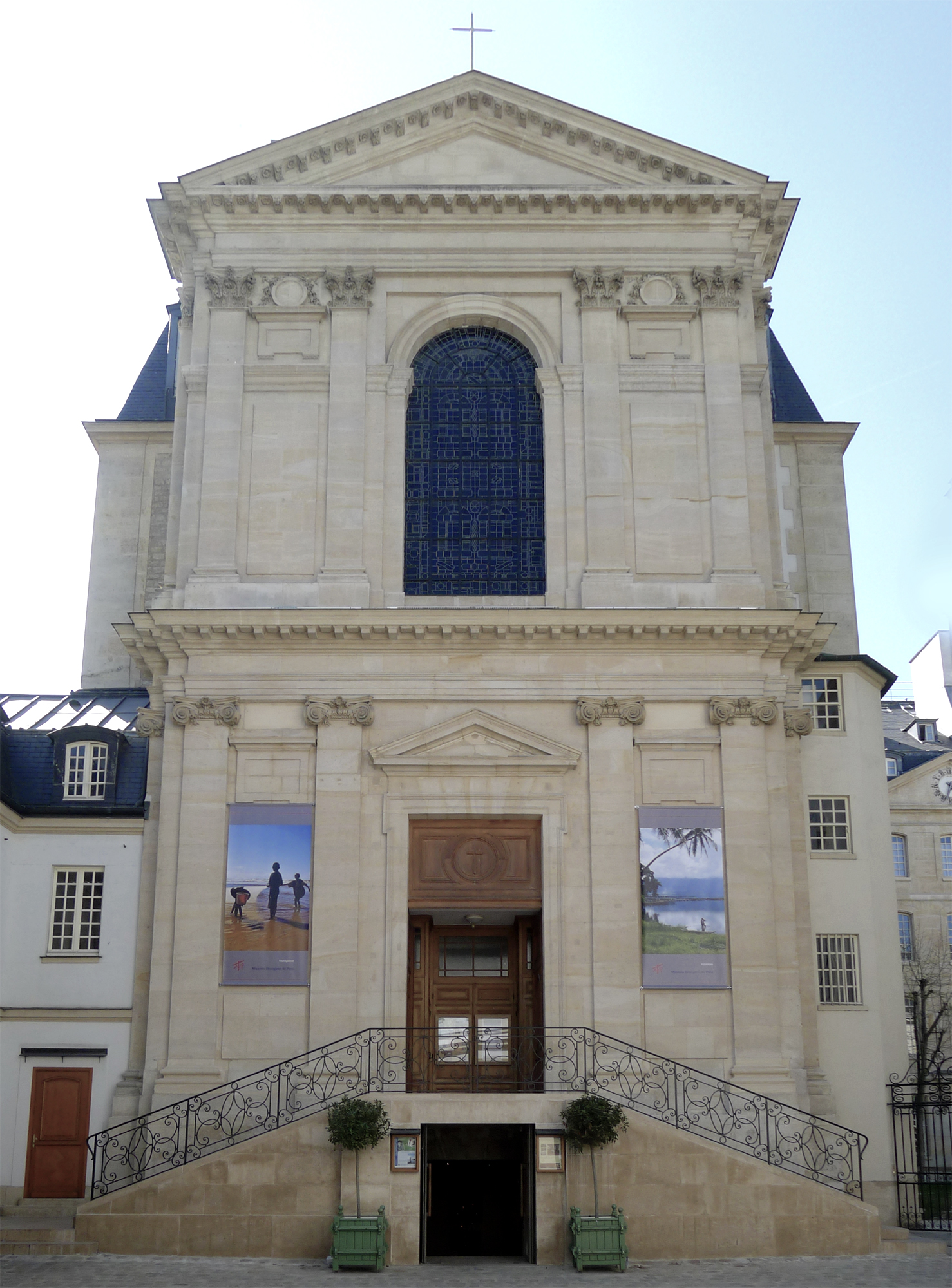 Façade de la chapelle de l'Epiphanie (missions étrangères de Paris, rue du Bac) - Paris VII